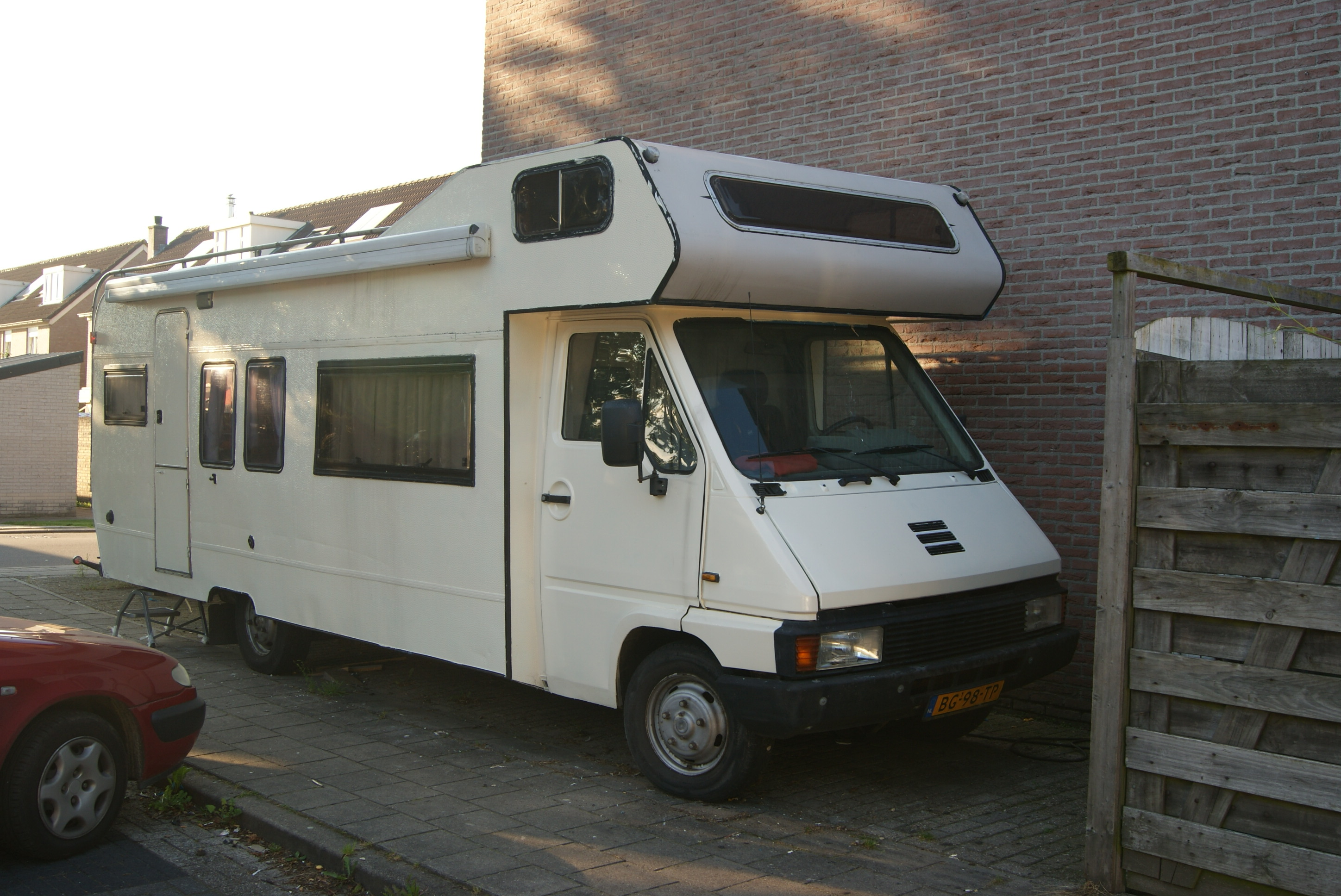 BG-98-TP